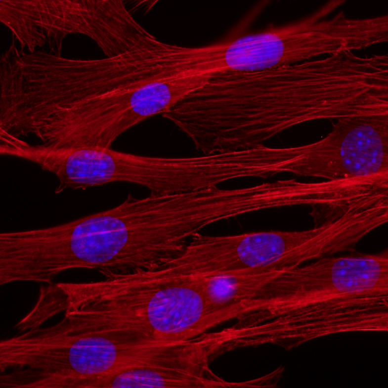 Cellules mammifères. Détection des filaments d'actine (rouge) et des noyaux (bleu).